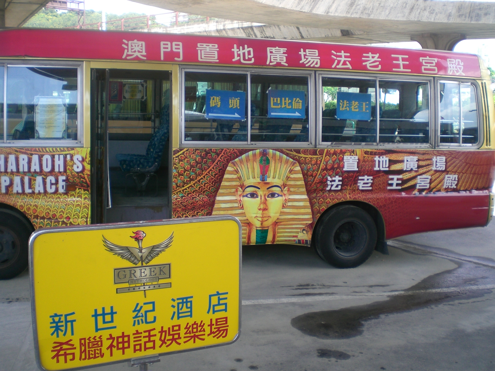 鄰近港澳碼頭的小巴站, 設有各線酒店娛樂場的免費穿梭小巴. 置地廣場 (澳門), 法老王宮殿娛樂場 (Pharaoh's Palace). Author= Mo707